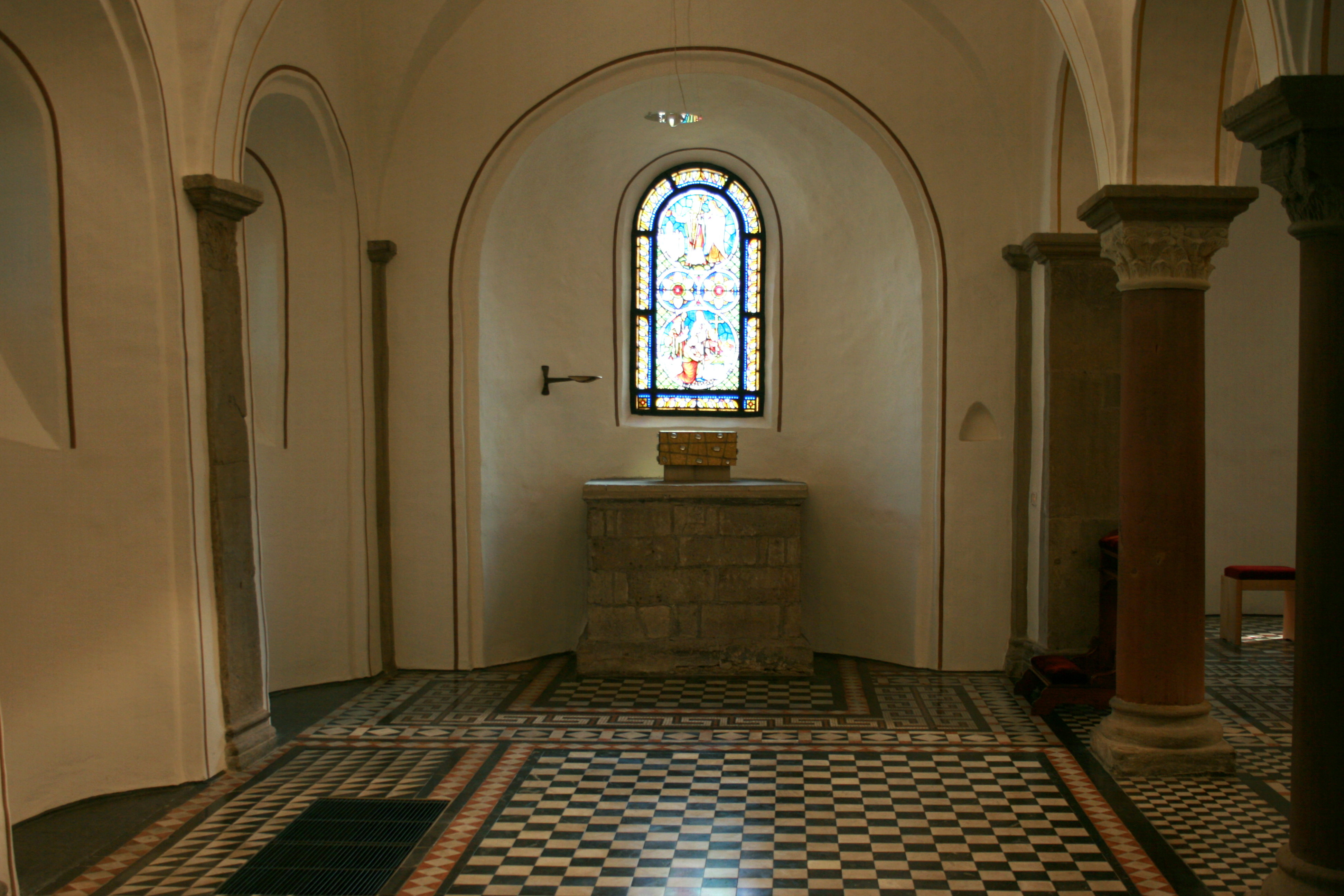 Krypta der Basilika Sankt Ludgerus, Kloster Werden, Essen-Werden